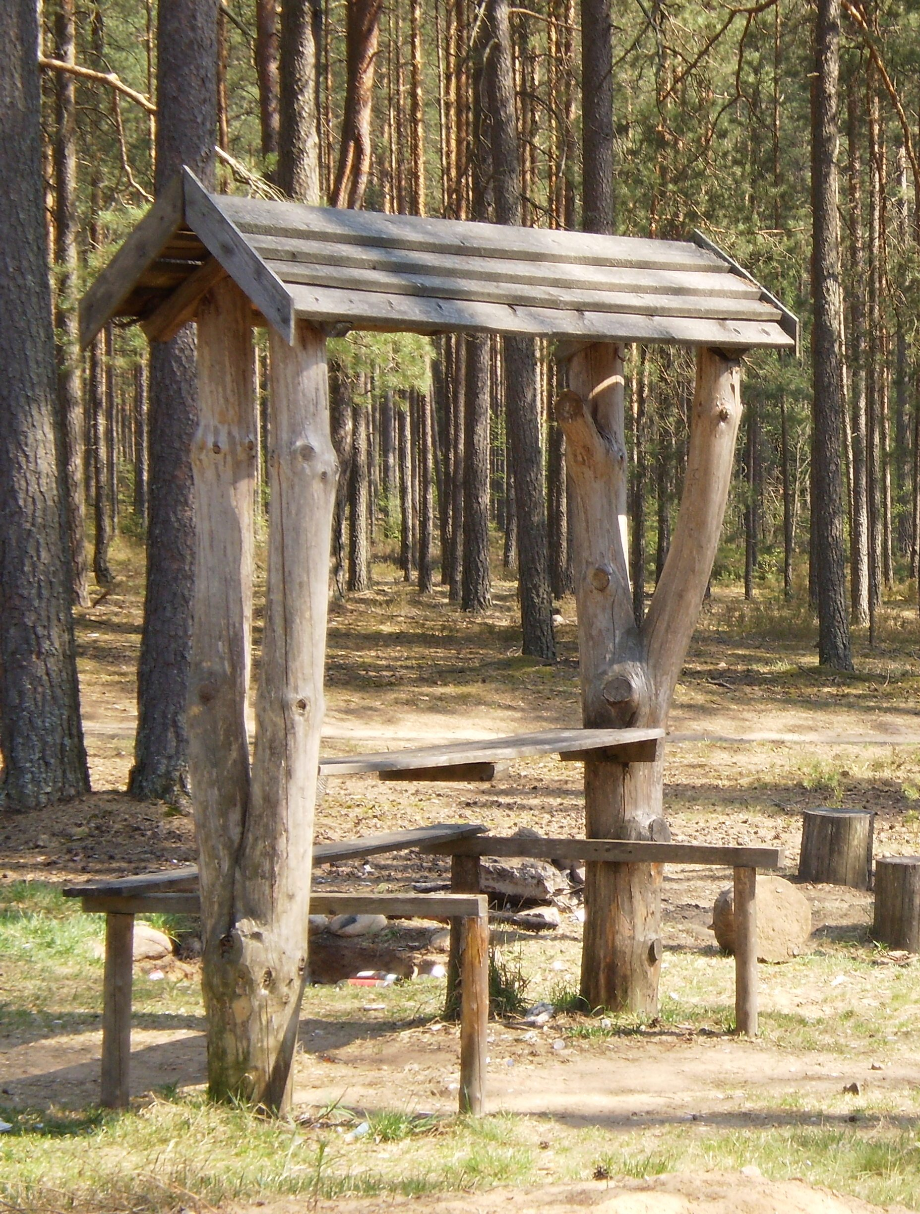 Бегомльский лес